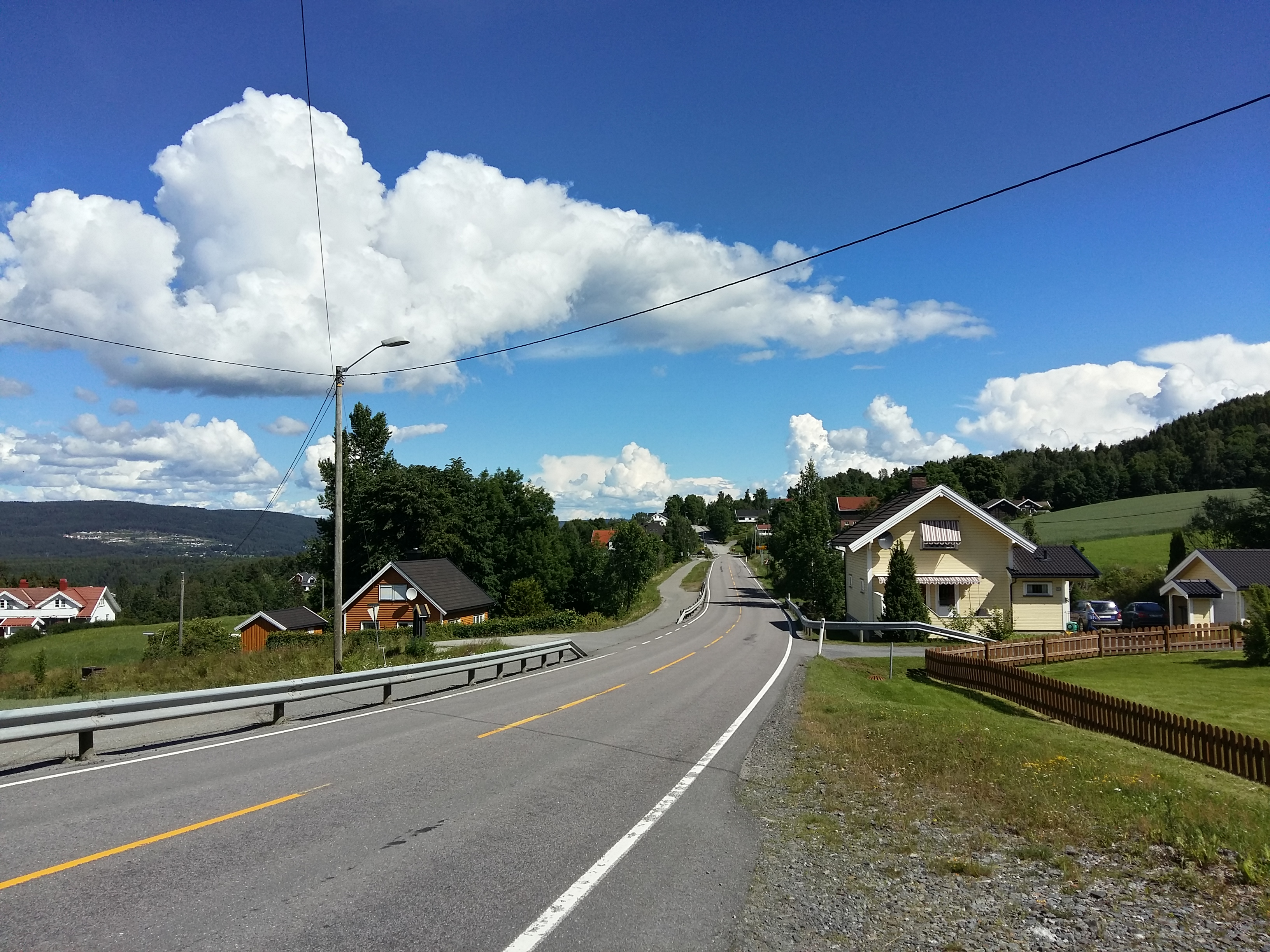 Åsbygda i Ringerike kommune.